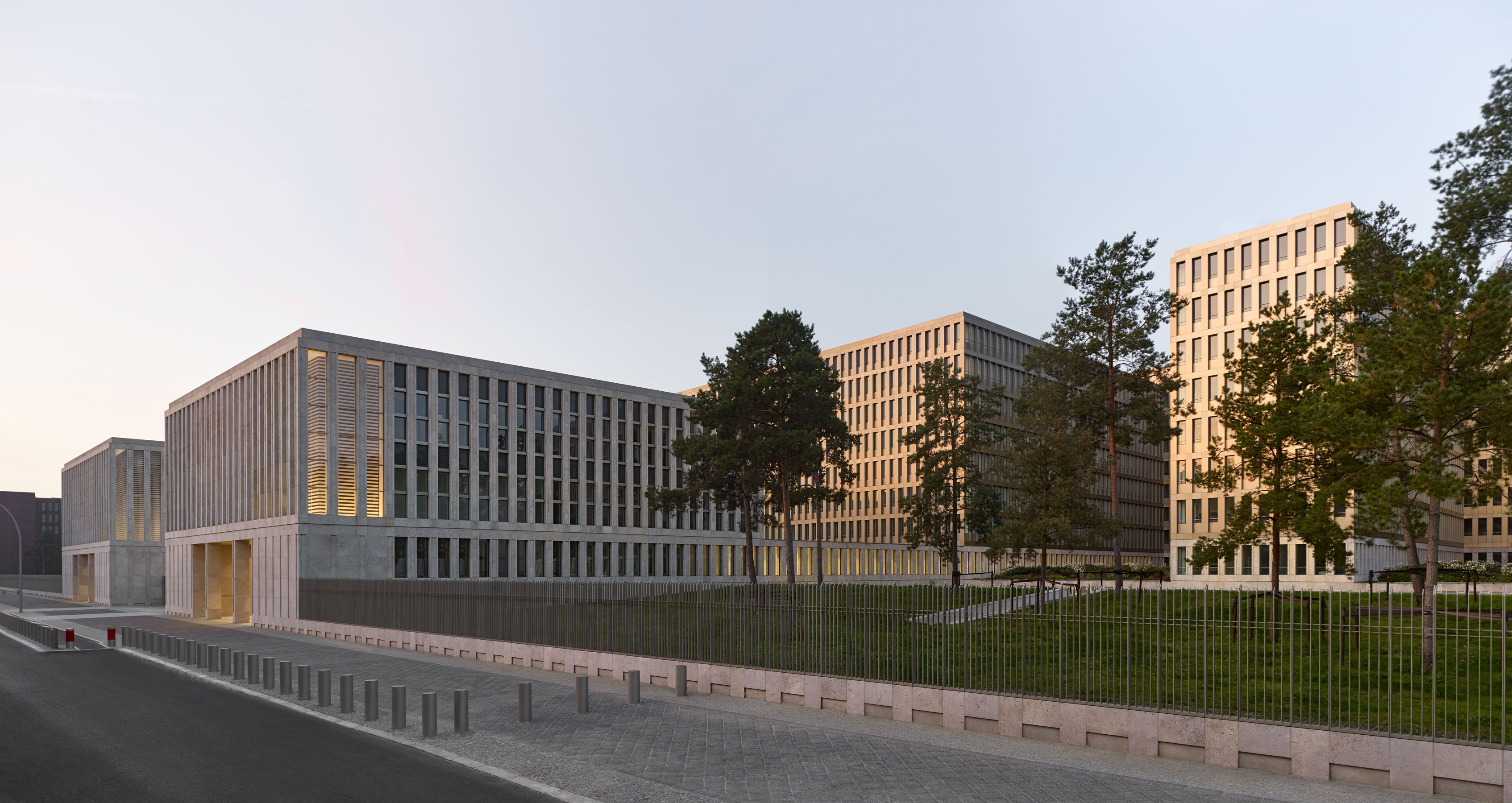 Zentrale des Bundesnachrichtendienst an der Chausseestraße, Berlin